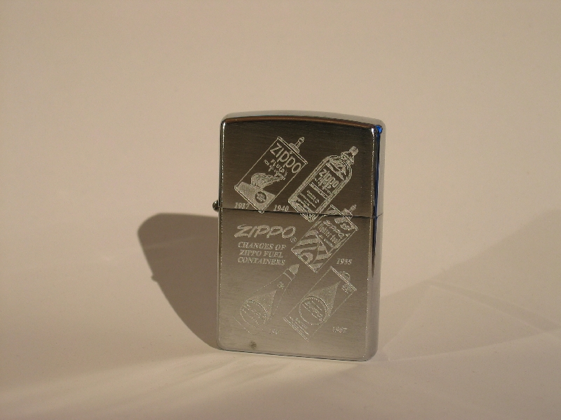 Zippo